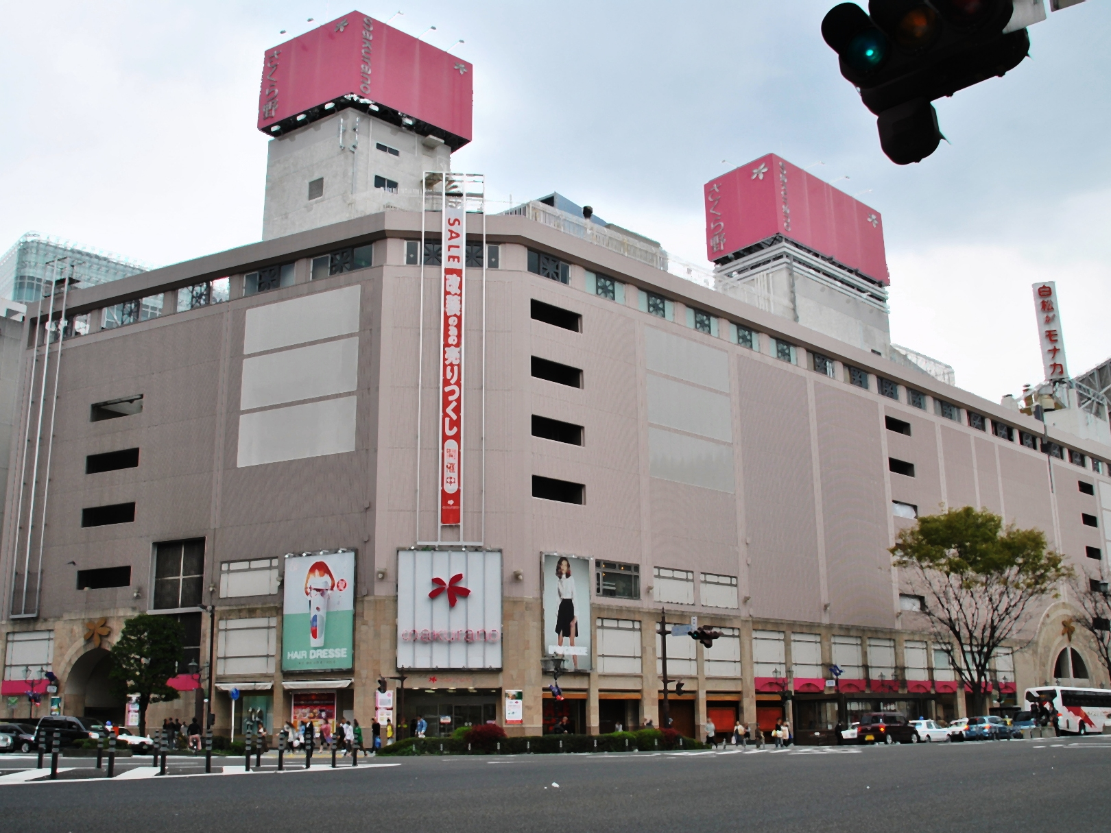 さくら野百貨店仙台店 Sakurano Hyakkaten Departmentstore. Sendai, Japan